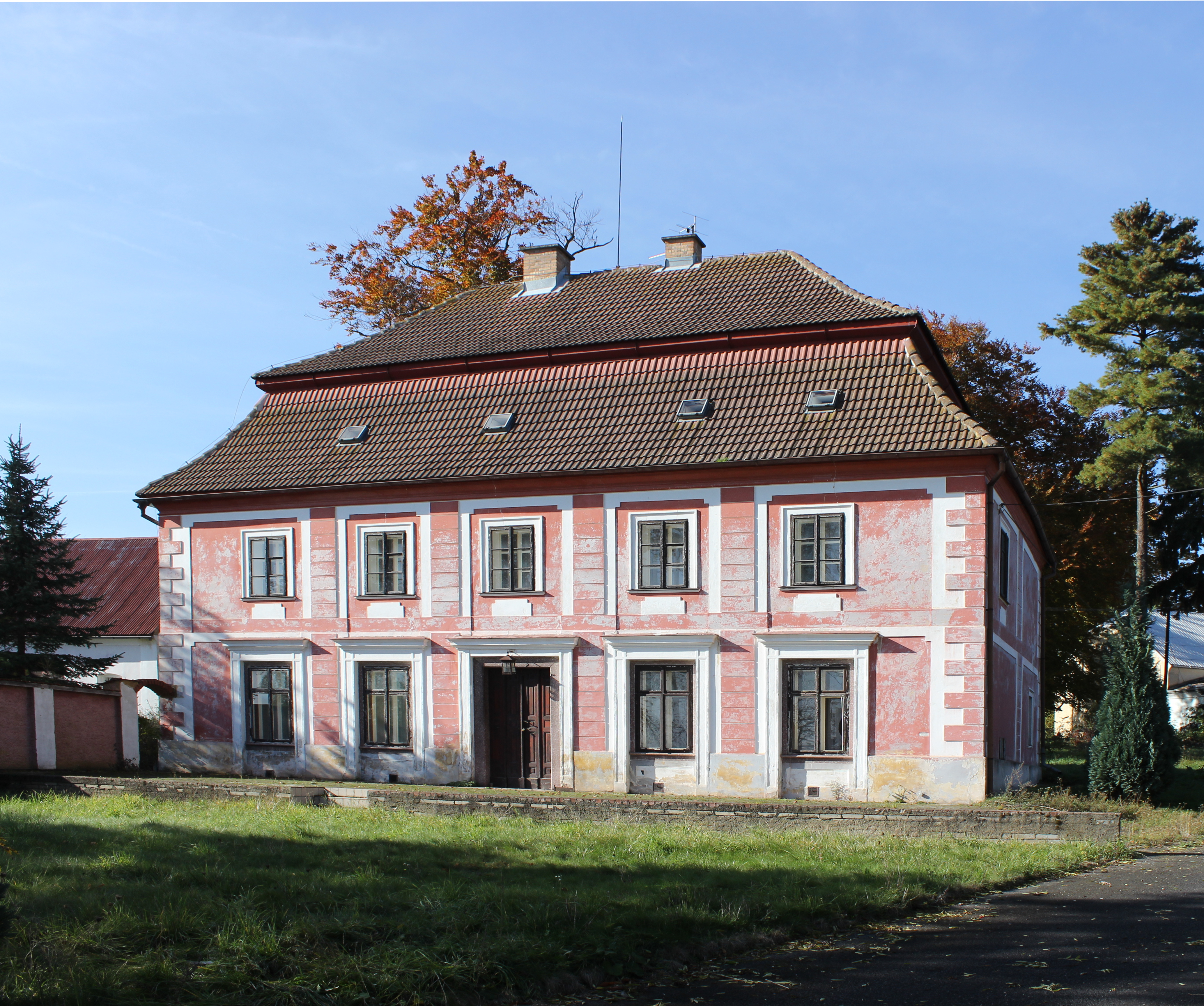 Zámek v Kostrčanech.